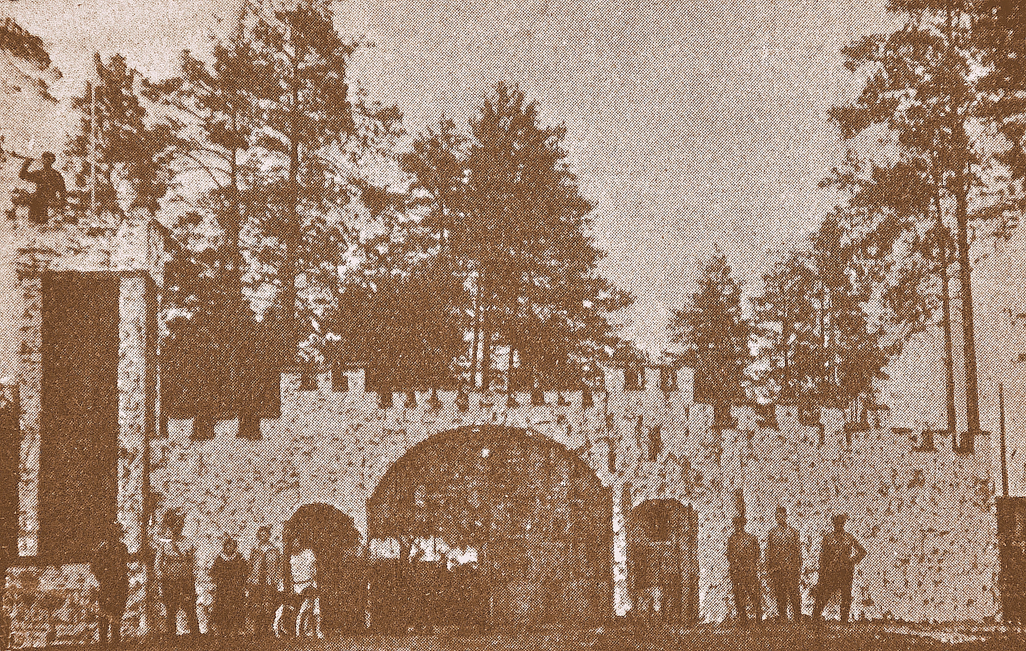 Oryginalny podpis pod zdjęciem: Brama wjazdowa do koszar odwodu kompanii w Lewaczach